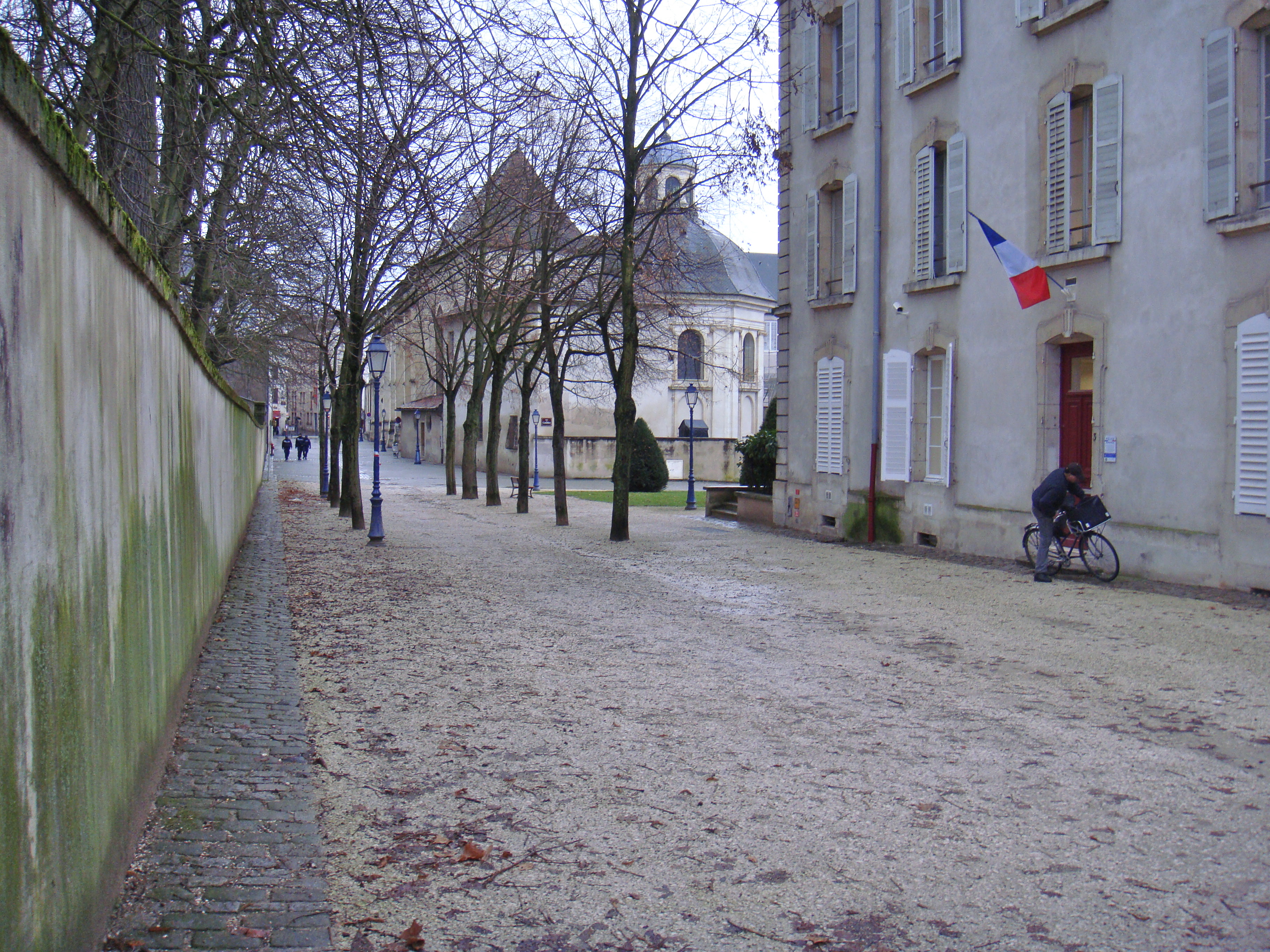 Nancy. Eglise et chapelle octogonale des Cordeliers.